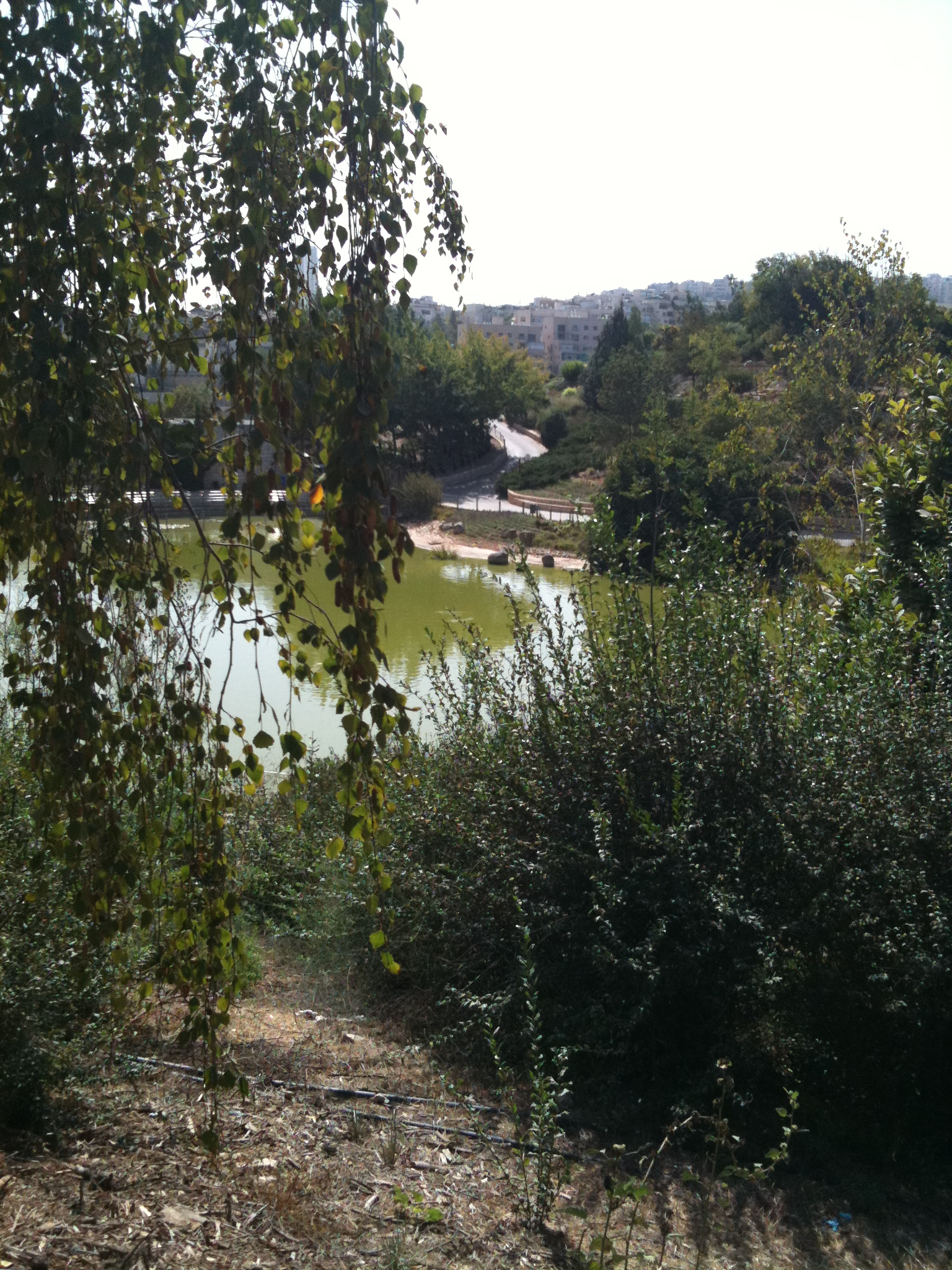 The Jerusalem Botanical Gardens, G. Ram, Jerusalem, Israel. הגנים הבוטניים של ירושלים, גבעת רם.